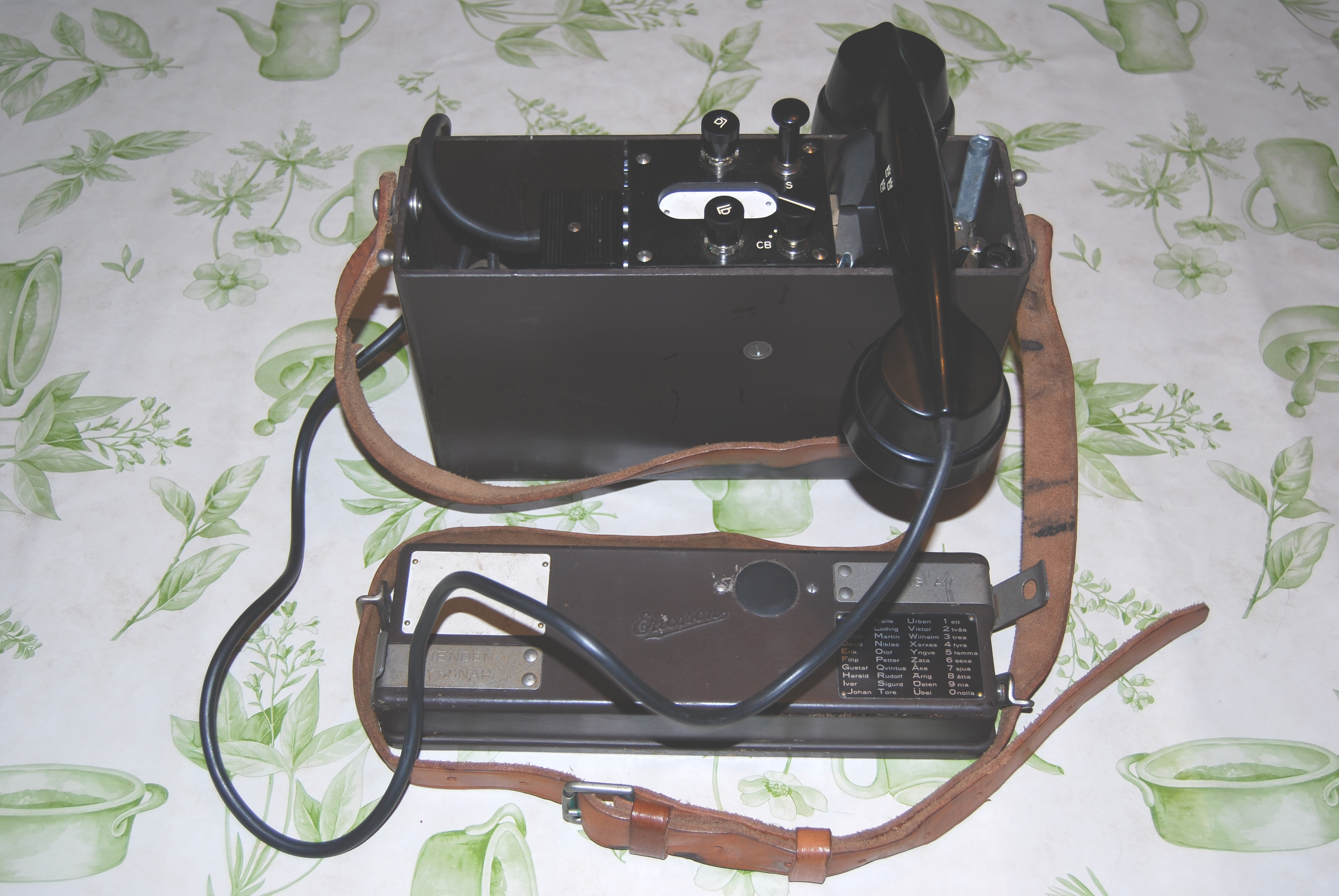 Fälttelefonapparat M37, "fältapa", konfigurerad för CentralBatteri-system (CB).